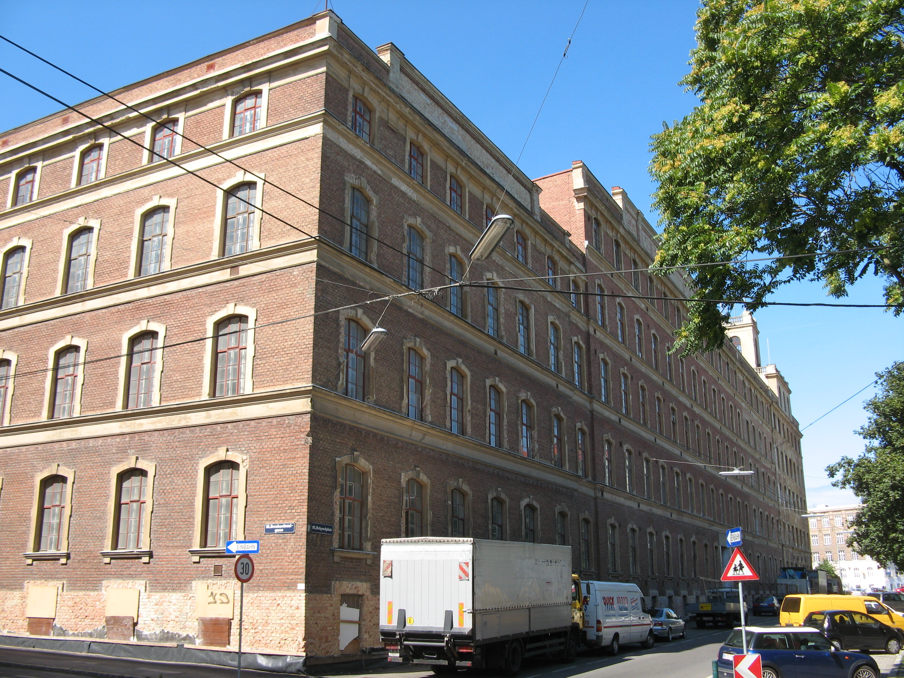 Ehemalige Schokoladefabrik Heller (1898-1914), Belgradplatz 3-5, Wien-Favoriten